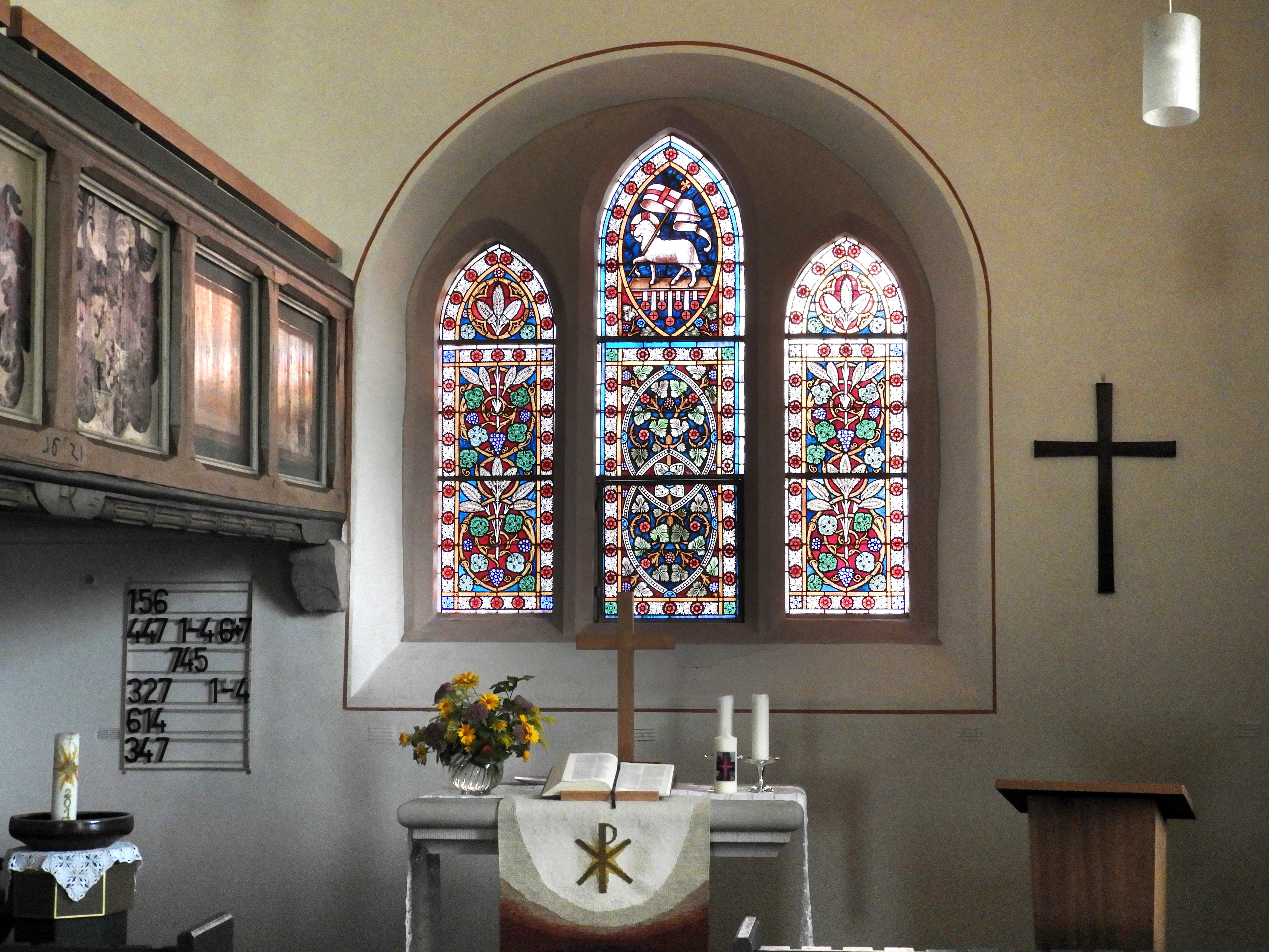 Albungen ist ein Stadtteil von Eschwege. Das dreiteilige Fenster-Ensemble entstand wahrscheinlich in der zweiten Hälfte des 19. Jahrhunderts und zeigt eine Mischung aus figürlichen und ornamentalen Abbildungen.